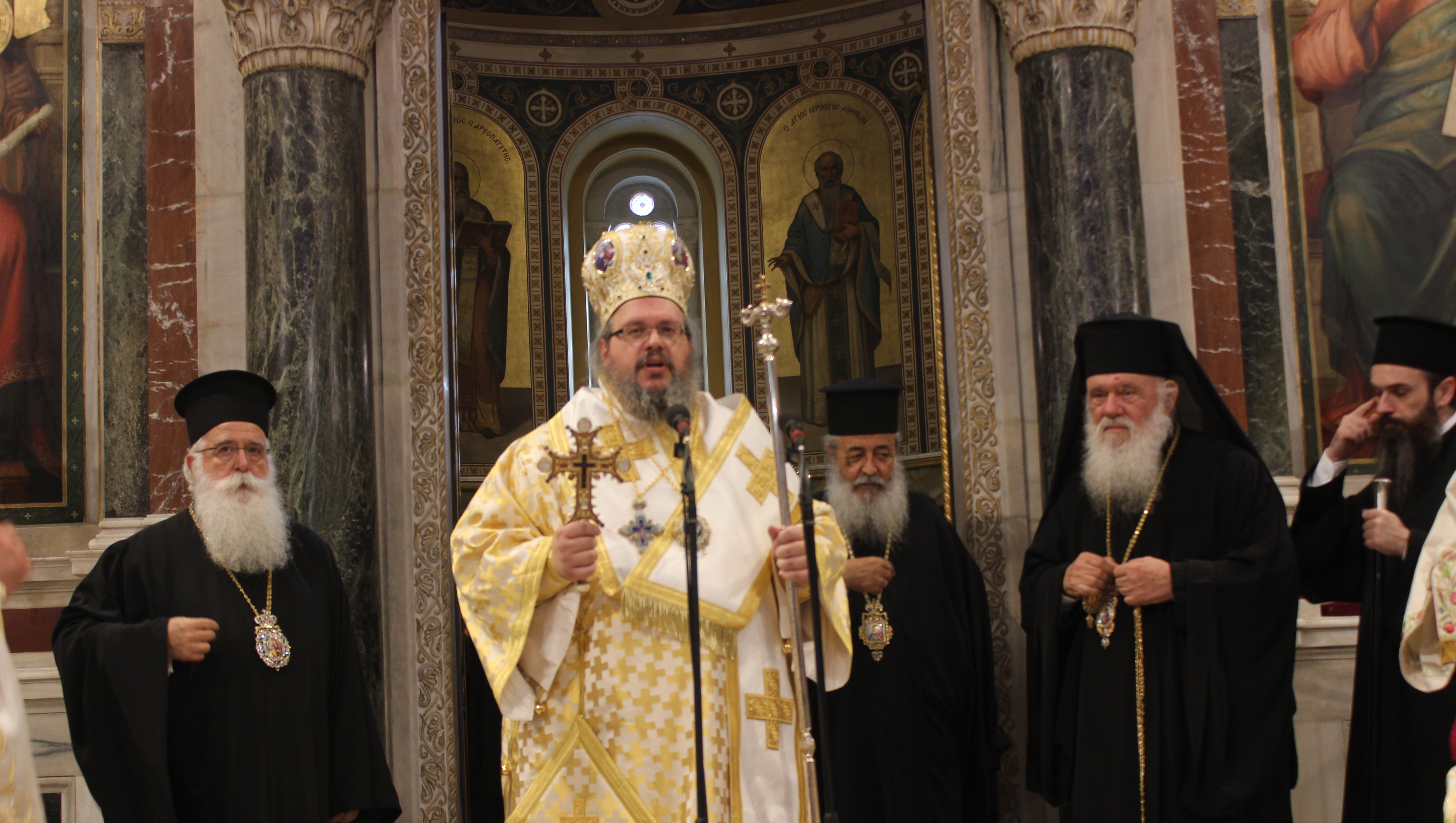 Ο Λαρίσης και Τυρνάβου Ιερώνυμος